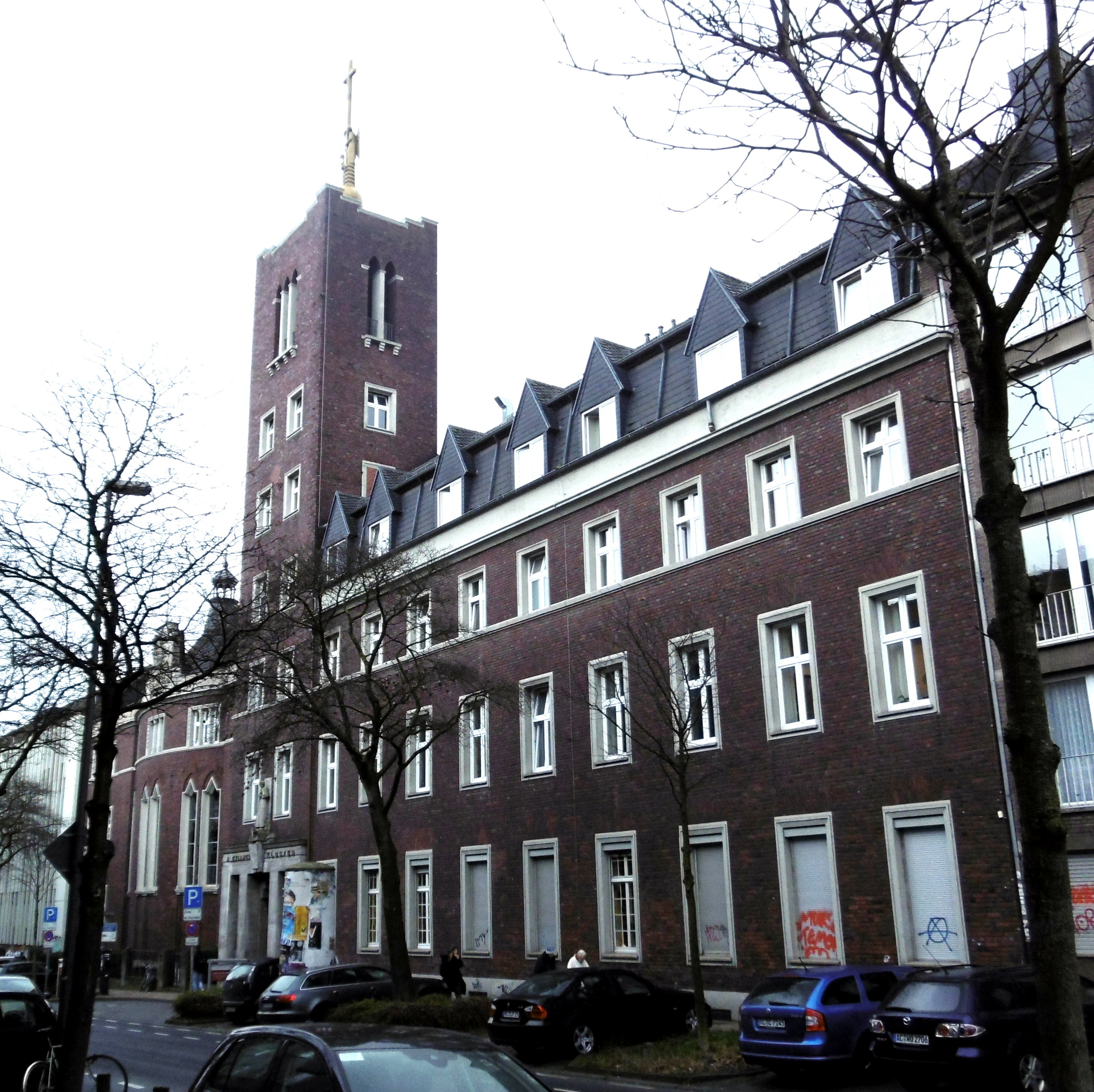 Hauptgebäude Alexianerkloster Aachen